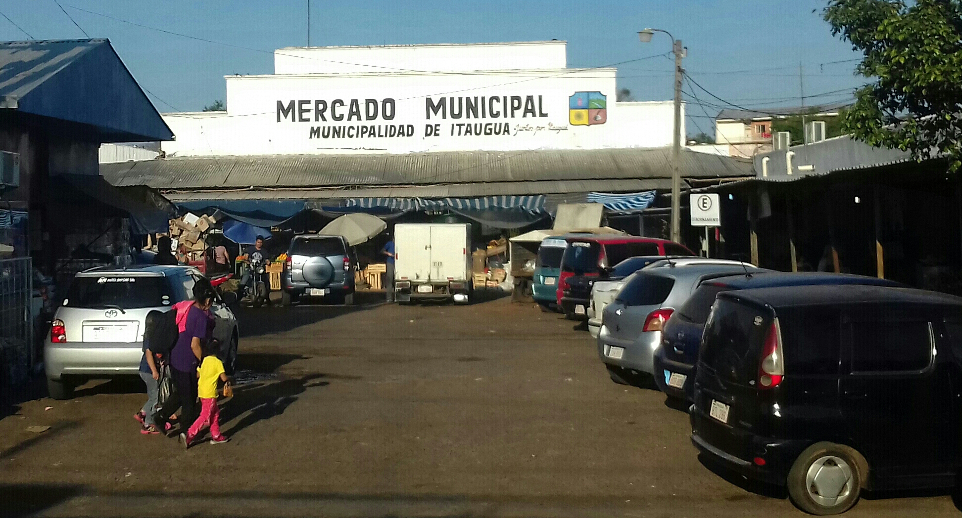 Aspecto que presentaba el tradicional mercado itaugueño en julio de 2019.